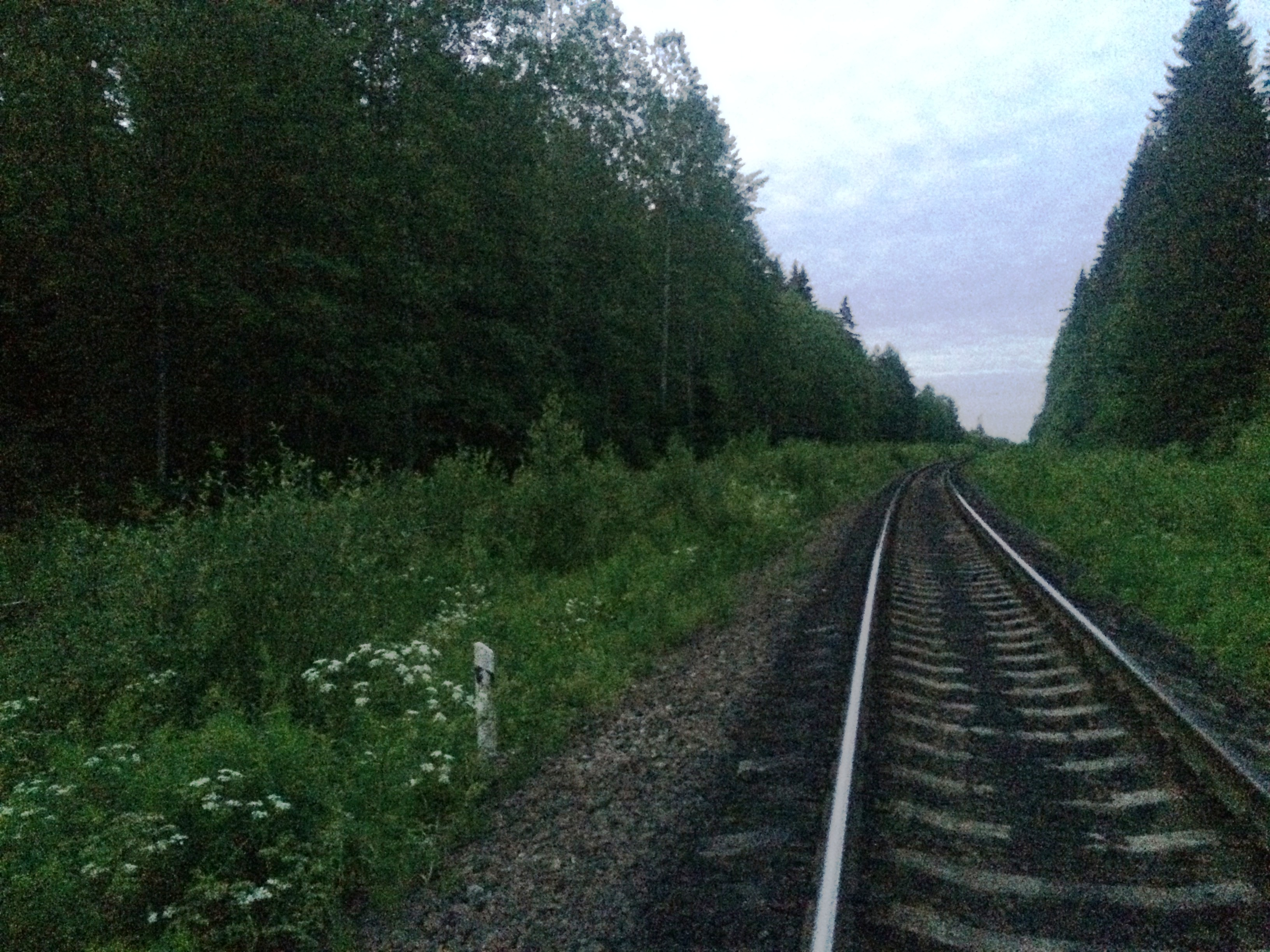 пп. Хелюля